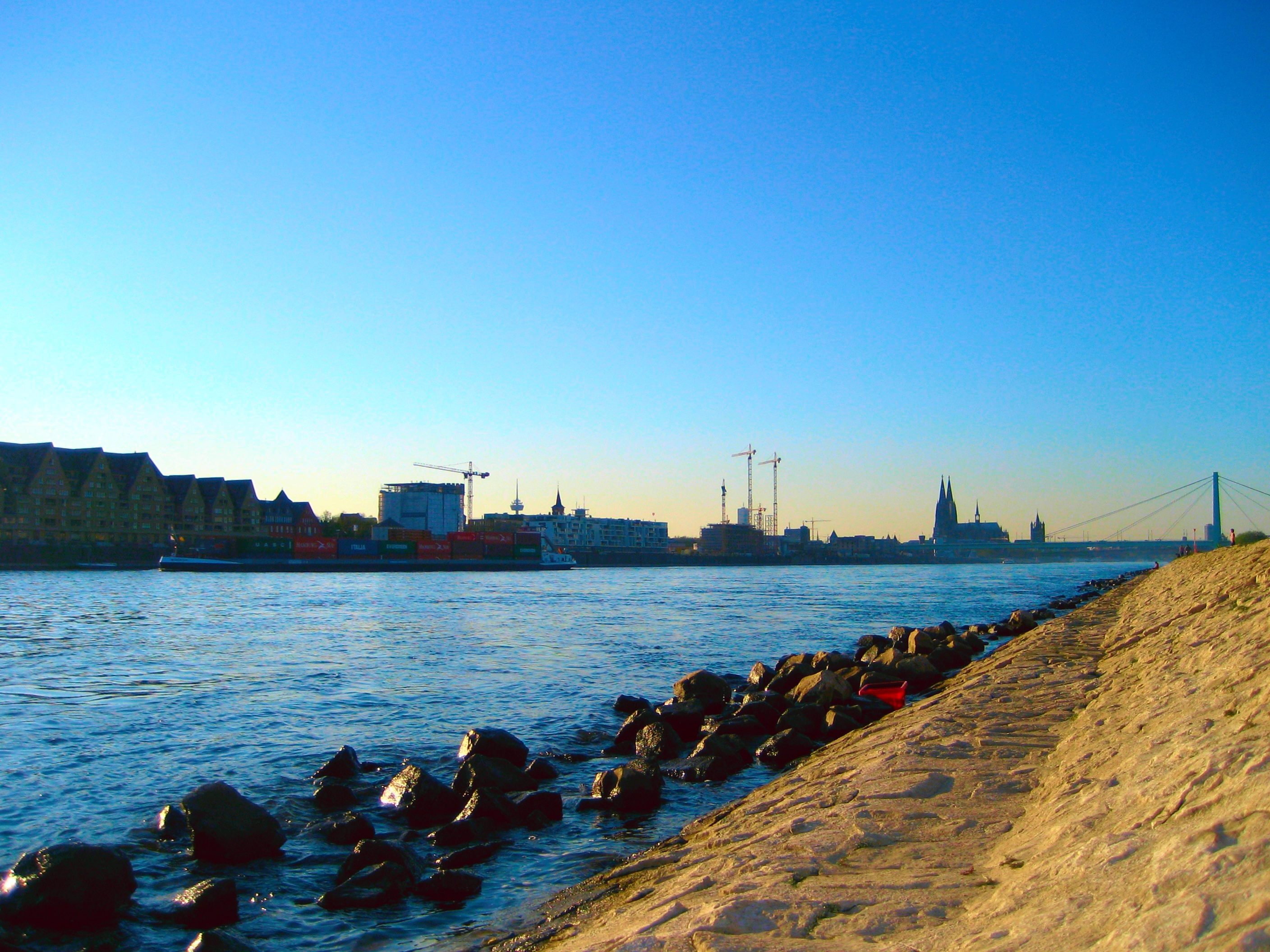 Rhein I